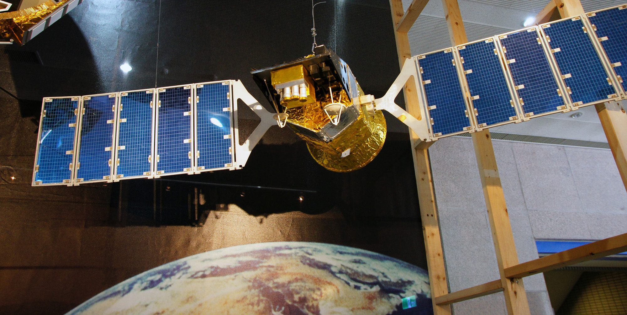 福爾摩沙衛星一號